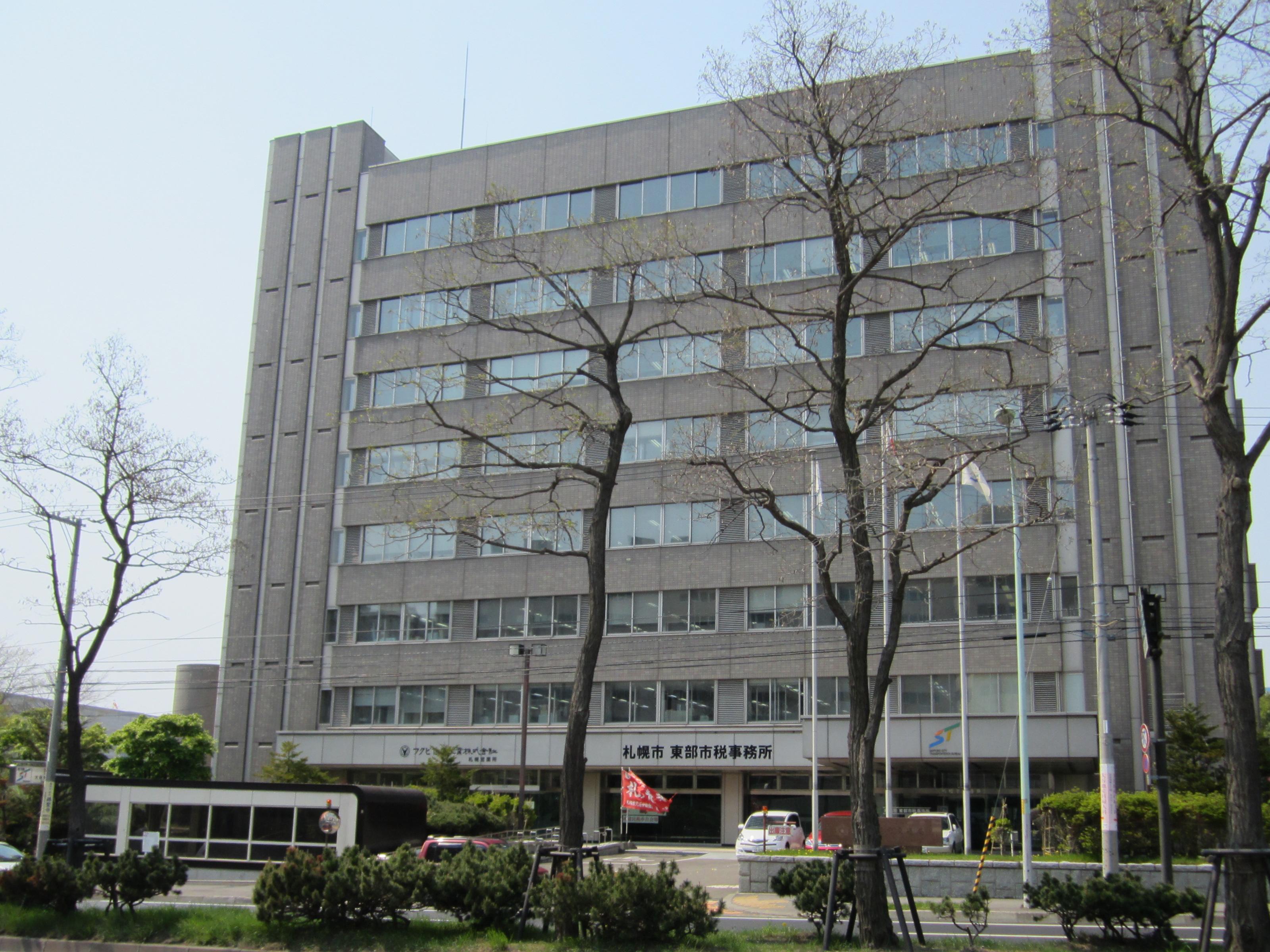 札幌市交通局と大谷地駅（2012年5月）